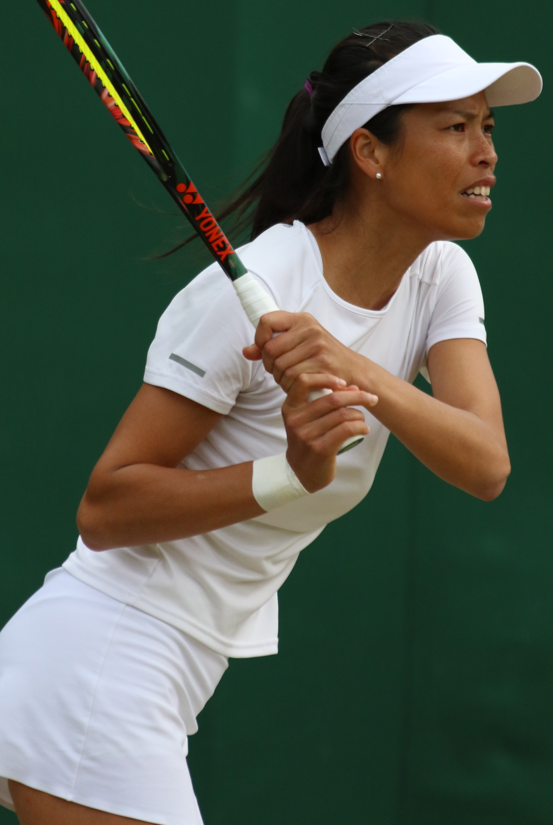 Hsieh WM19 (22)